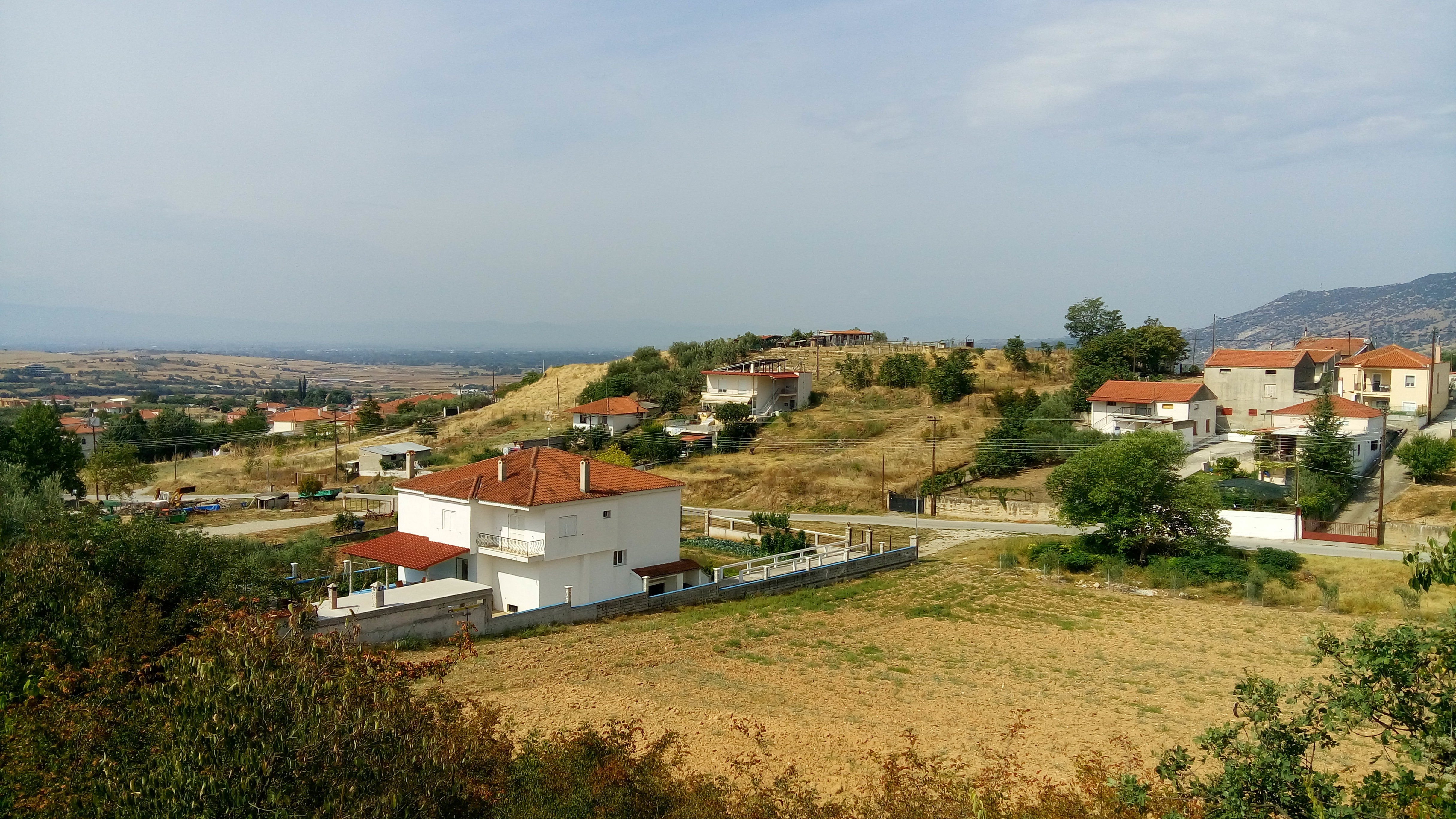 Ο λόφος της Αγριάνιστας όπου βρέθηκαν ευρήματα αρχαιολογικού ενδιαφέροντος και αποδεικνύουν το ότι η περιοχή του Νέου Σουλίου ήταν κατοικημένοι με μόνιμους οικισμούς από την αρχαιότητα.